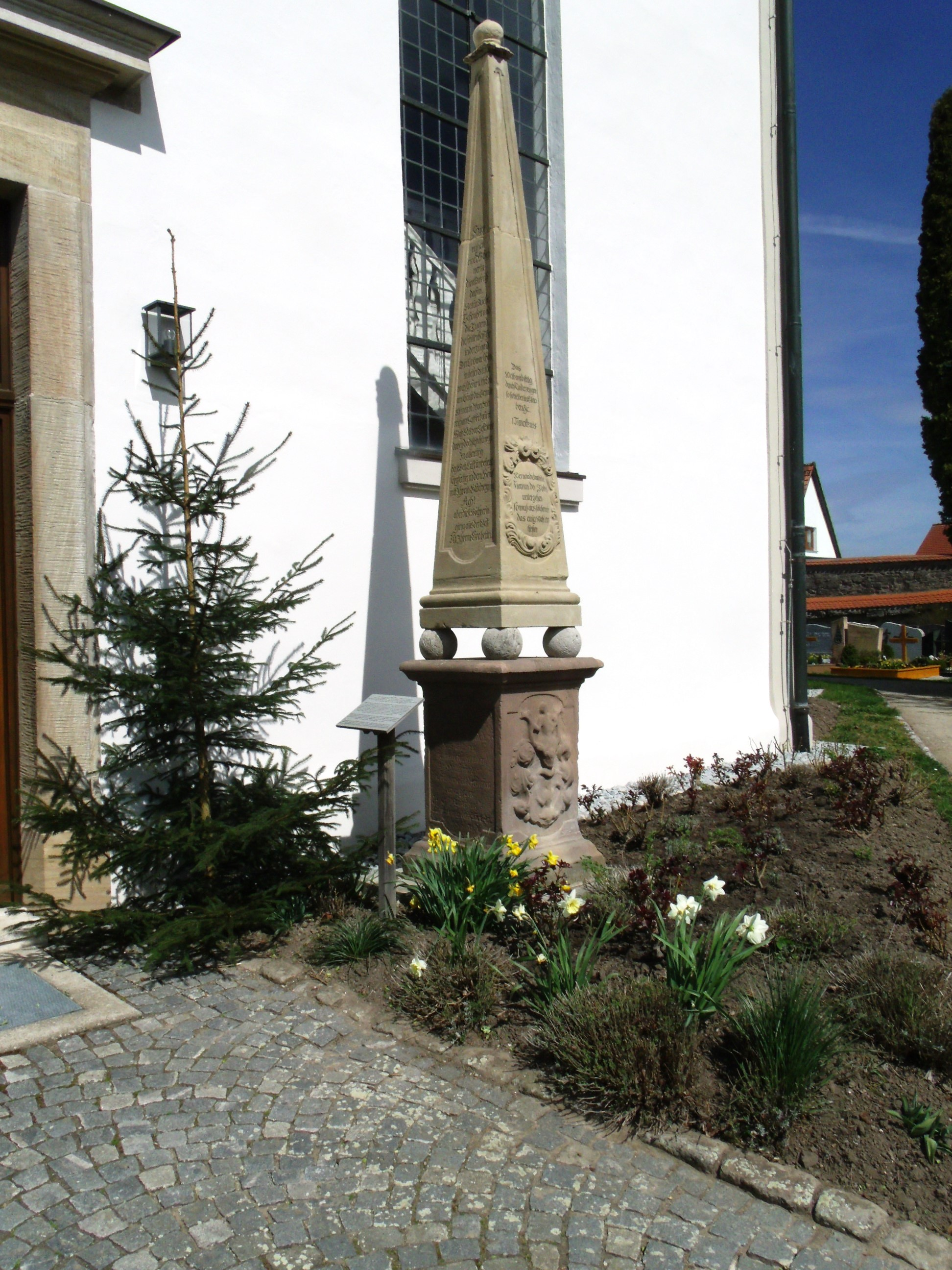 St. Wenzeslaus Weißenkirchberg